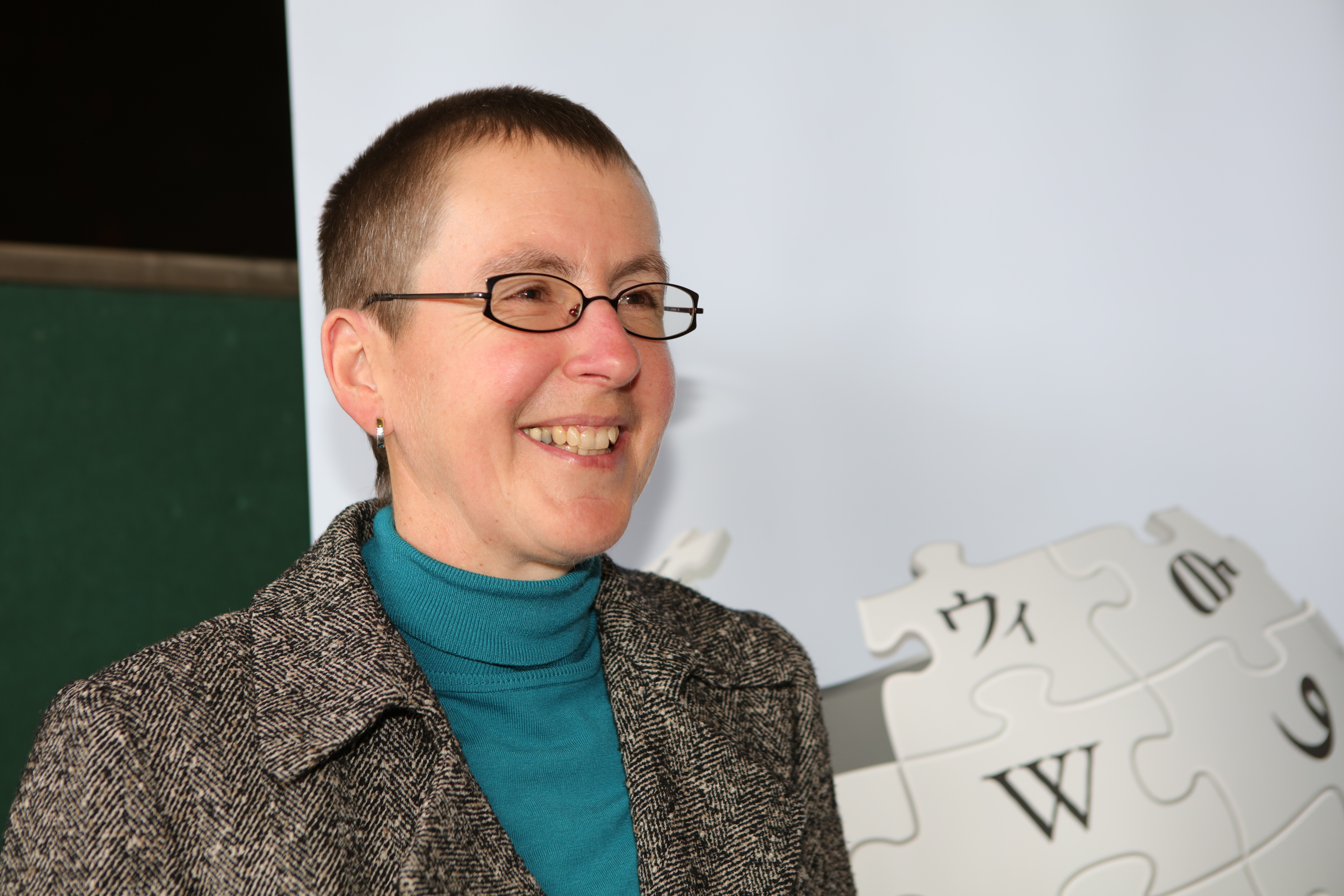 Frau Prof. Dr. Sabine Laschat von der Universität Stuttgart (Deutschland) am Wikipedia Stand, auf der Chemiedozententagung 2016 in der Universität Heidelberg bzw. der Mitgliederversammlung der Arbeitsgemeinschaft Deutscher Universitätsprofessoren und -professorinnen für Chemie (ADUC).